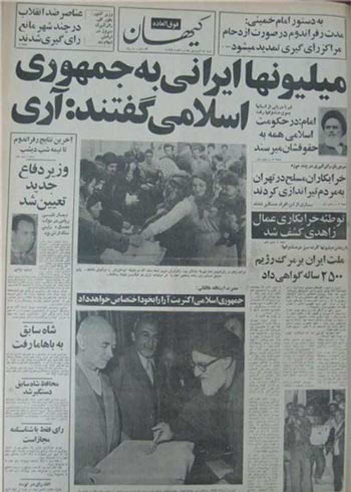 صفحهٔ نخست روزنامهٔ کیهان ۱۲ فروردین ۱۳۵۸ (نسخهٔ فوق‌العاده)